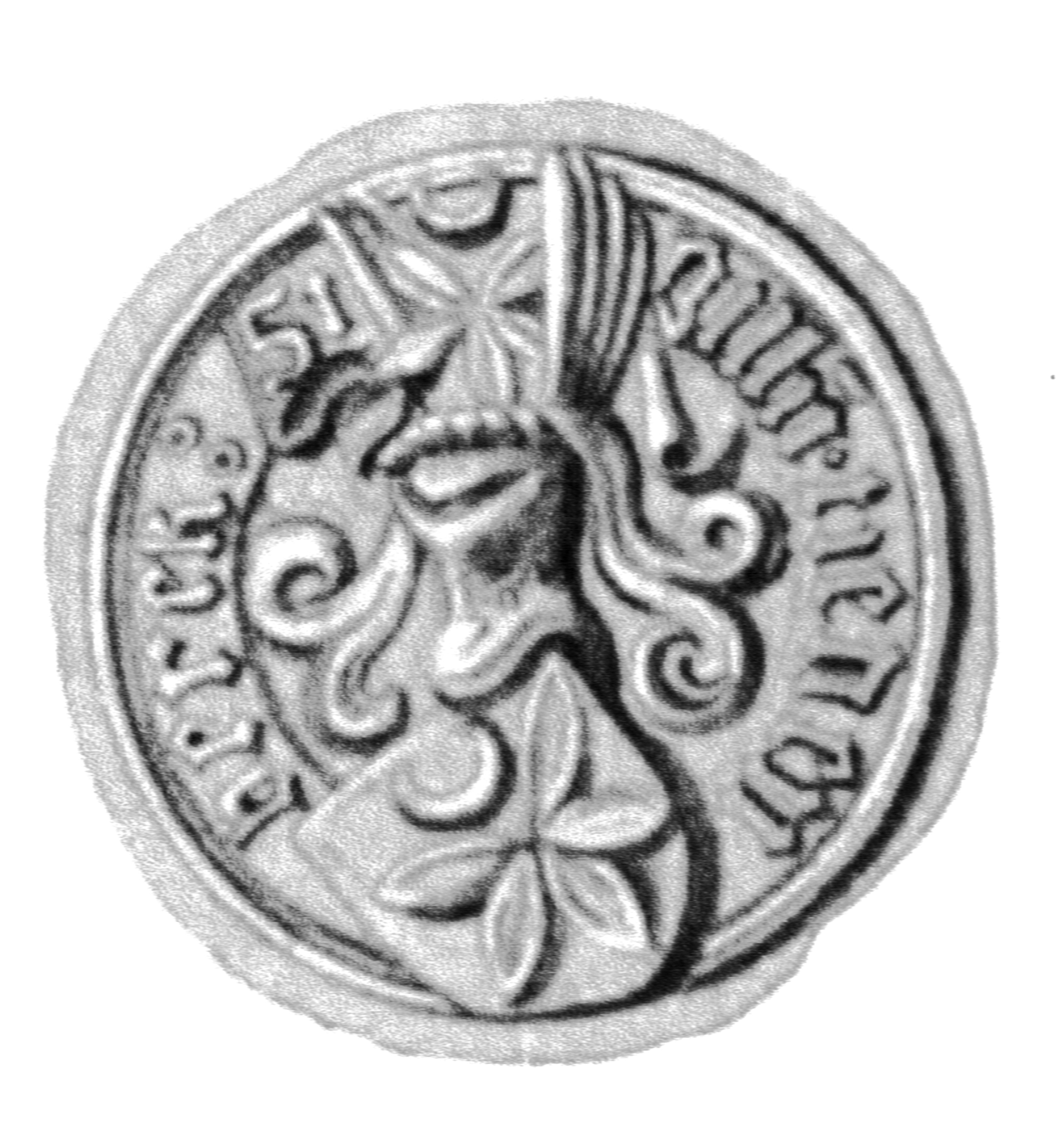 Siegel des Ratsmannes Tidemann Ber(c)k. Das Siegel stammt aus der Zeit um 1510. Siehe Emil Ferdinand Fehling: Lübeckische Ratslinie, Nr. 576 (Tideman Berck).